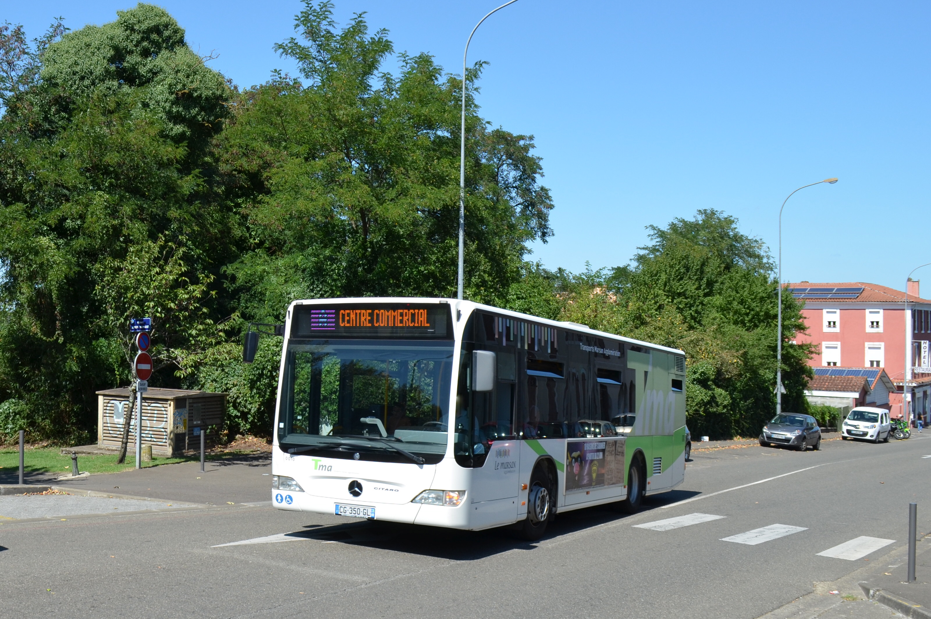 Mercedes-Benz Citaro K n°:0010 sur la ligne A à Mont-de-Marsan Pôle de Correspondances du réseau Tma